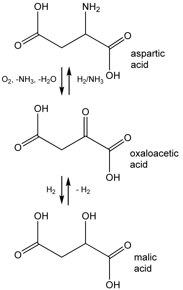 malic acid -aspartic acid- oxaloacetic acid structures